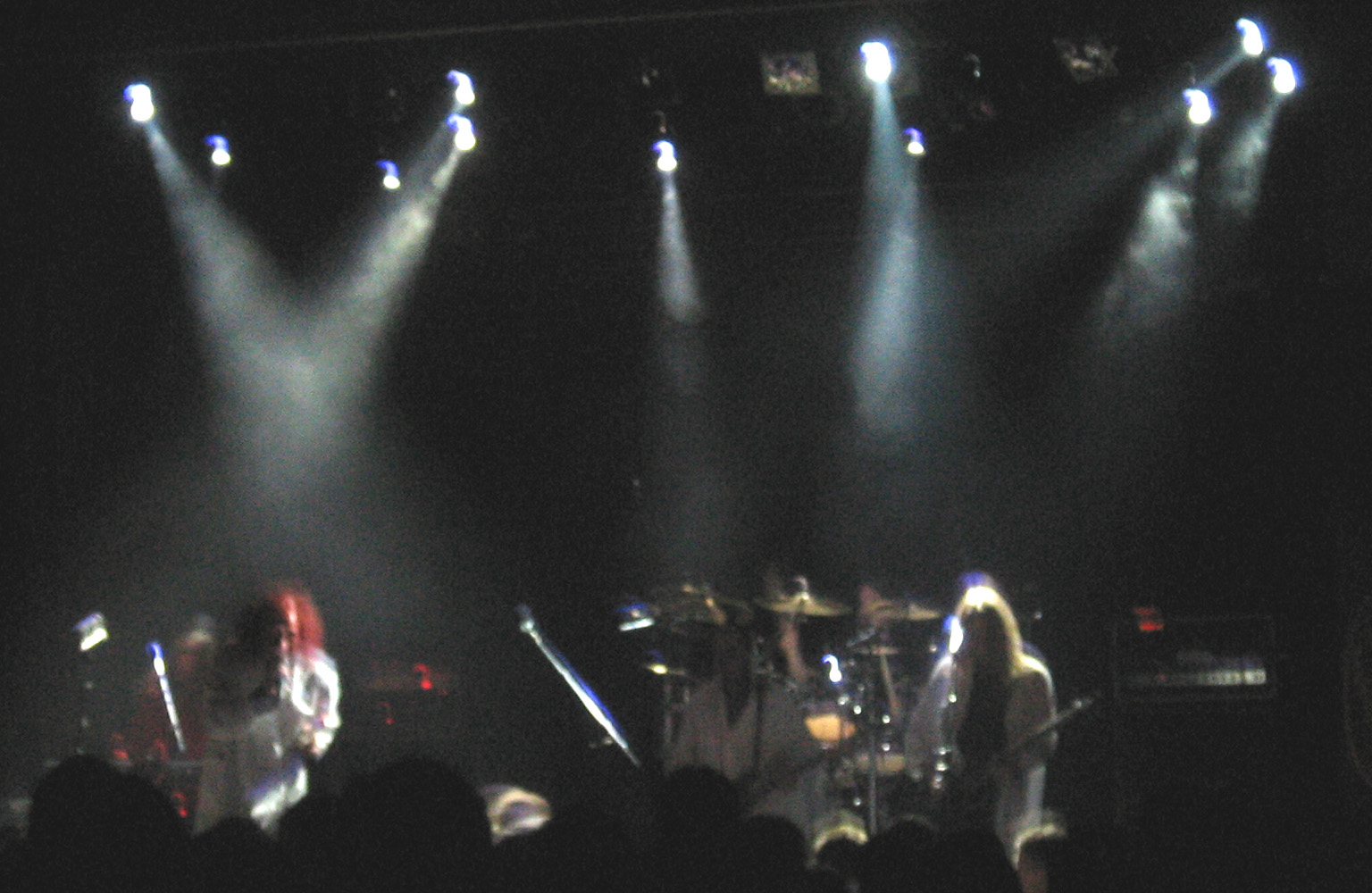 Waltari Tavastialla 18.1.2006